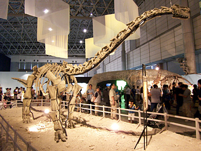 Sonidosarus